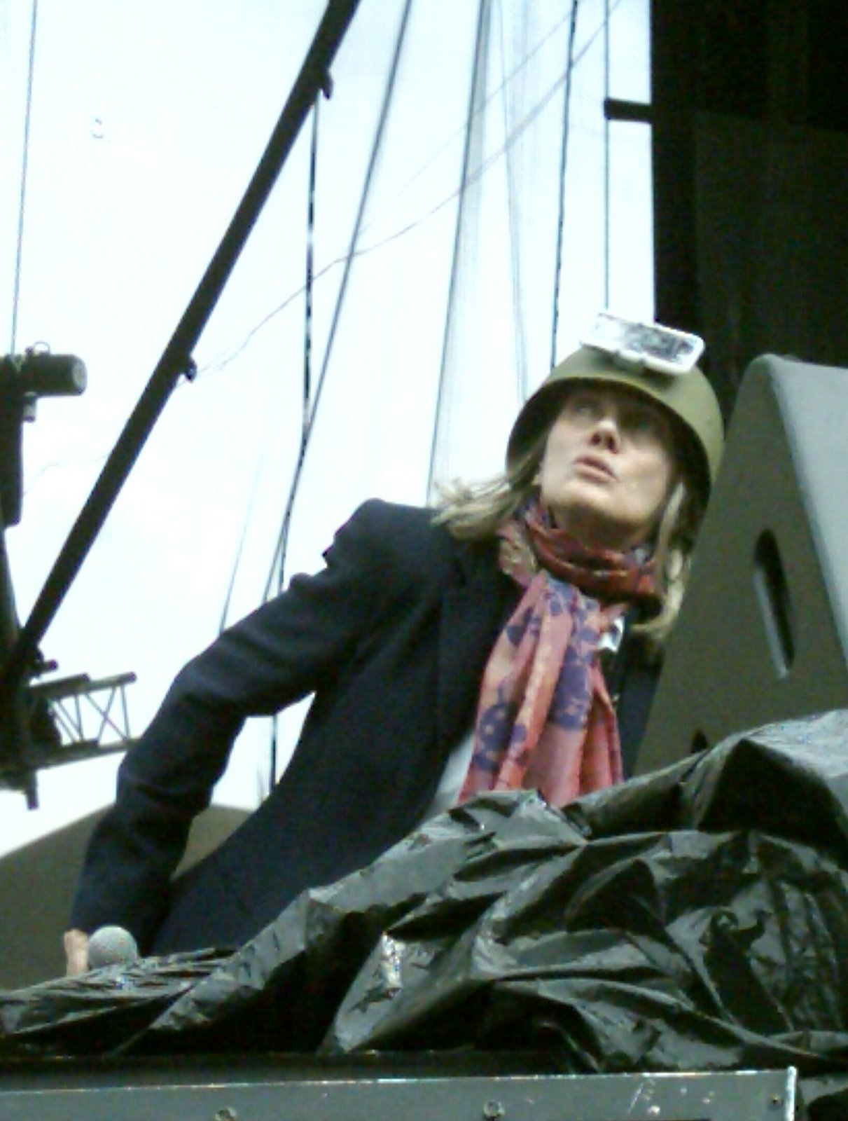 Diane Dufresne lors d'une répétition du spectacle Terre, planète bleue présenté aux FrancoFolies de Montréal